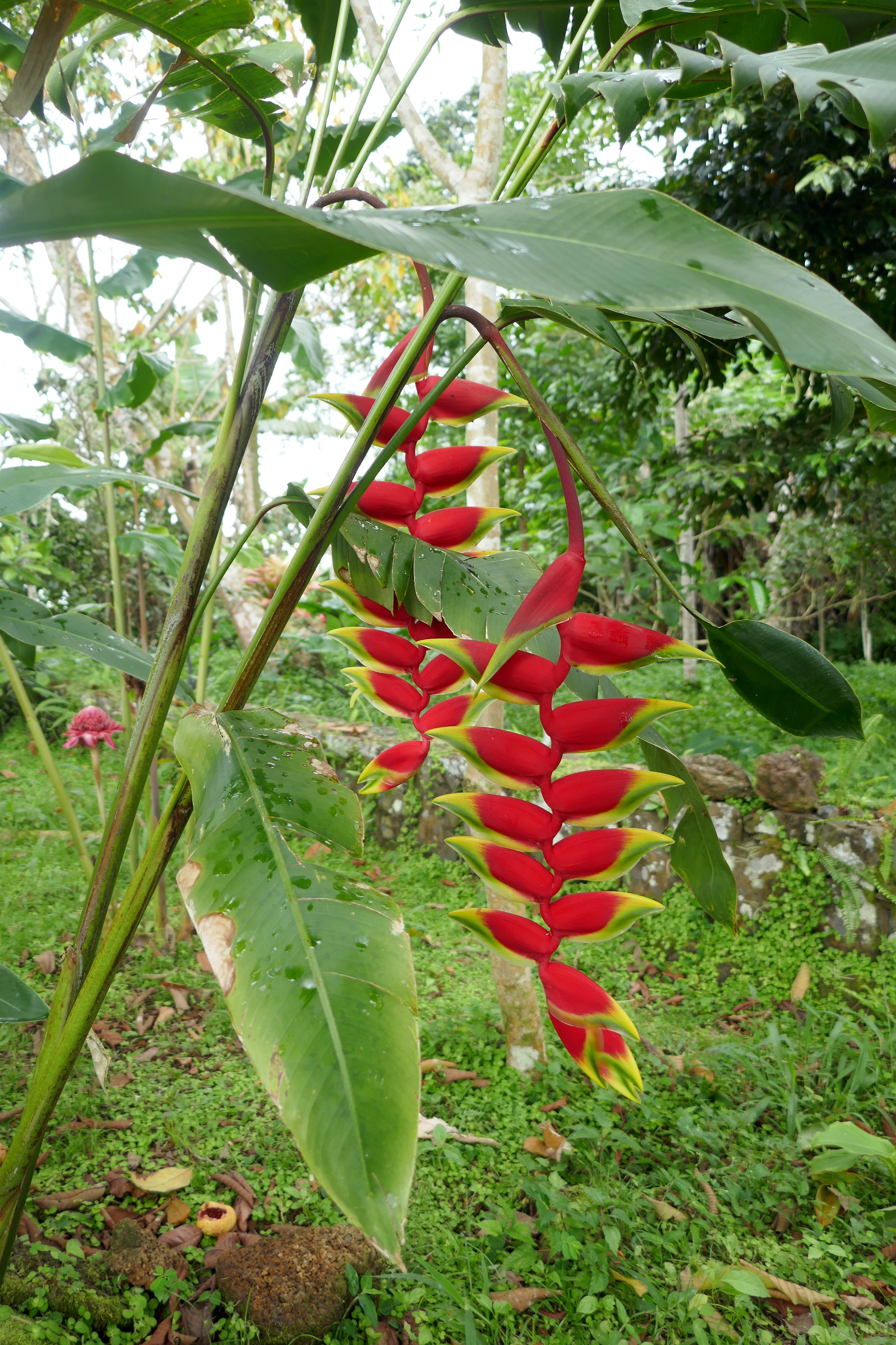 Heliconia rostrata au jardin botanique Bom Sucesso sur l'île de São Tomé (São Tomé-et-Principe).